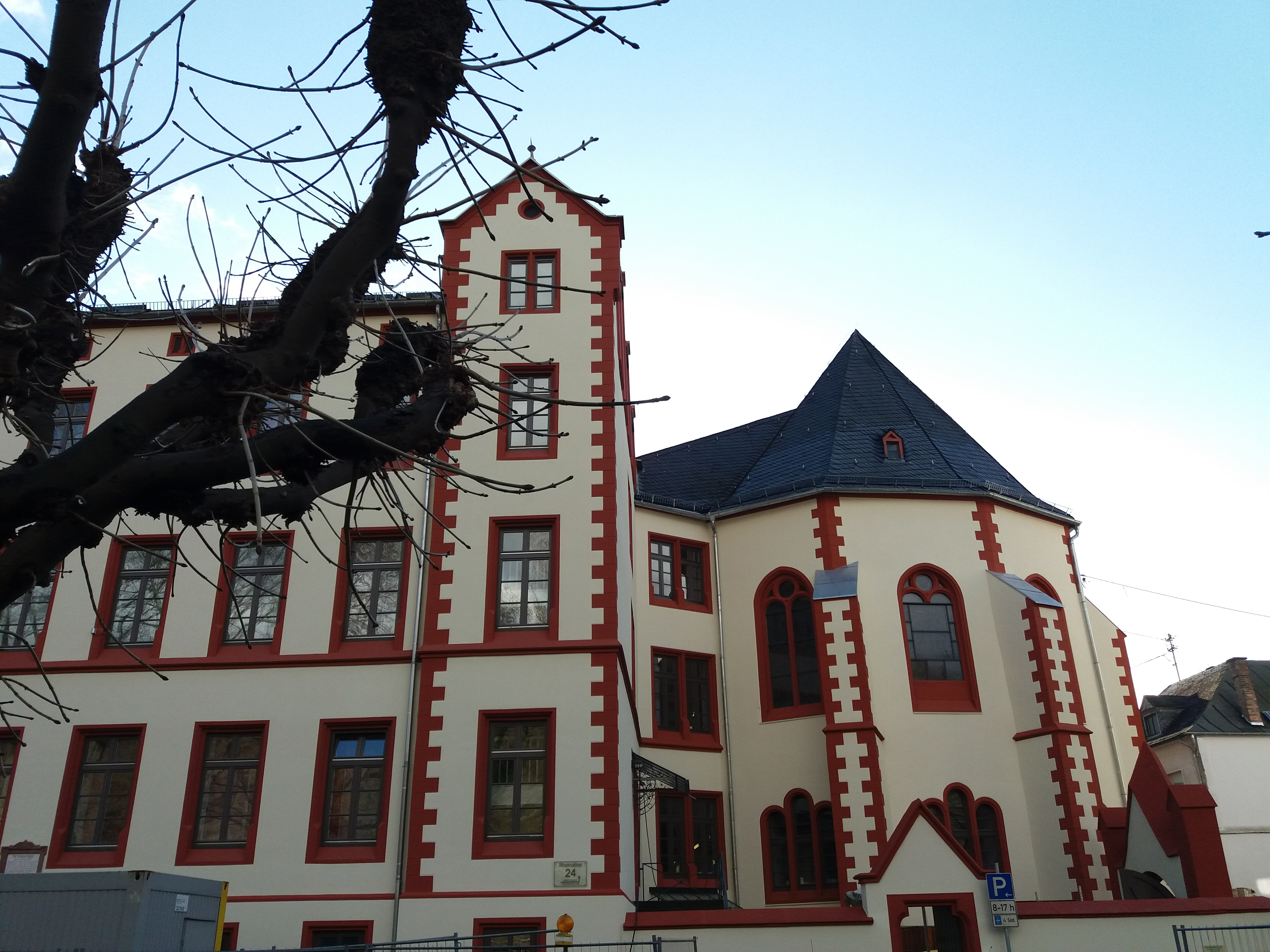 Franziskaner-Kloster Boppard Nord-Ansicht